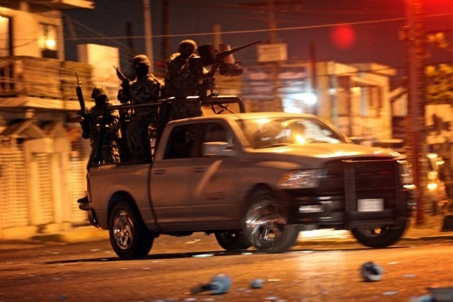 trasporte de tropas